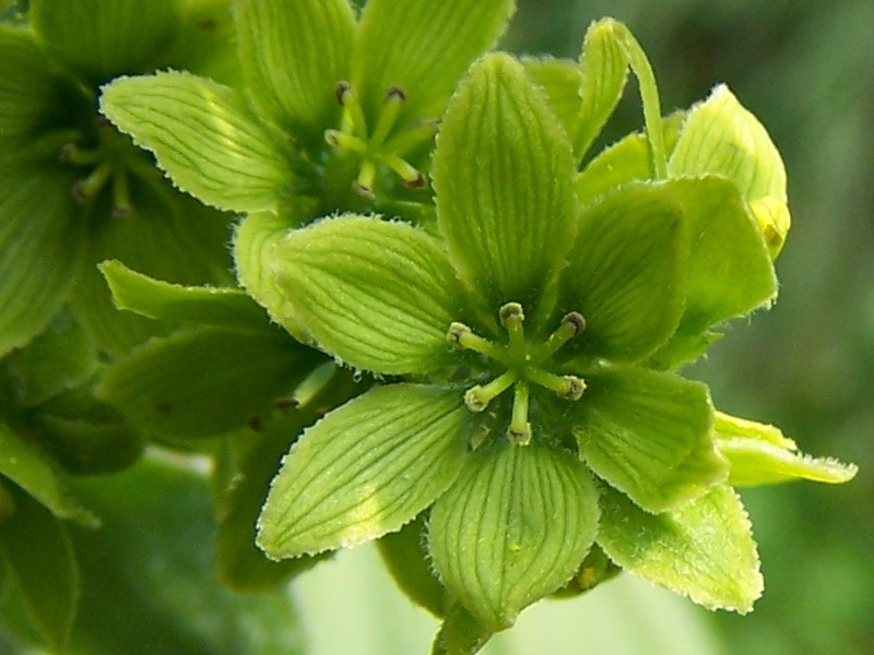 Veratrum lobelianum (pl. ciemiężyca zielona)